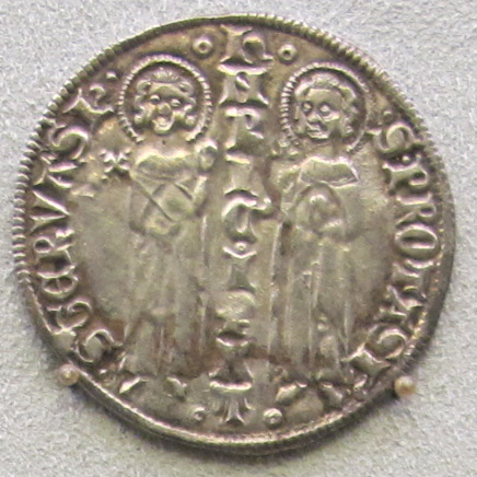 Milano, enrico VII, grosso, 1310-1313